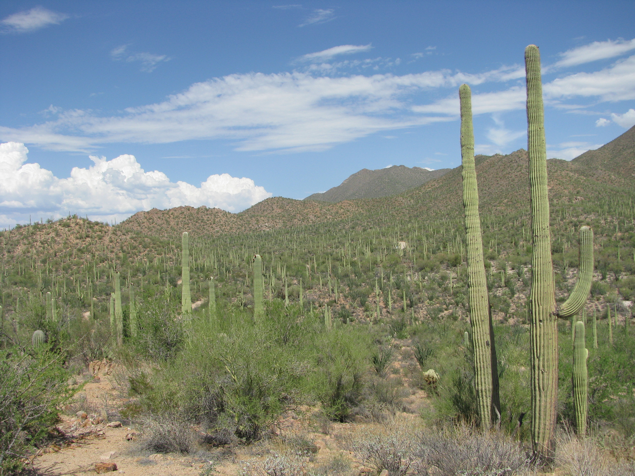 Saguaro-Kaktus